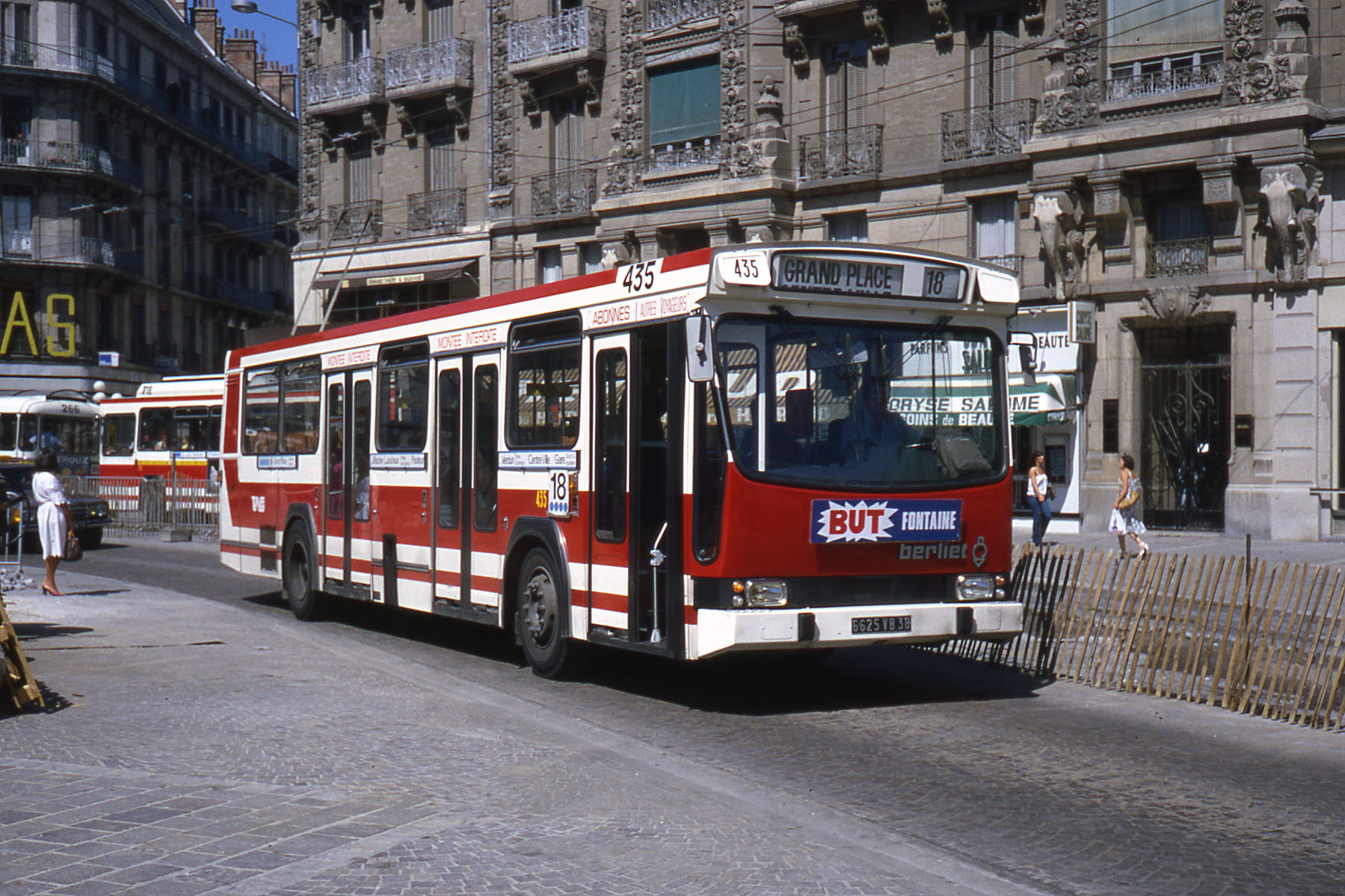 Un Berliet PR100 MI rue Felix Poulat à Grenoble en 1980.